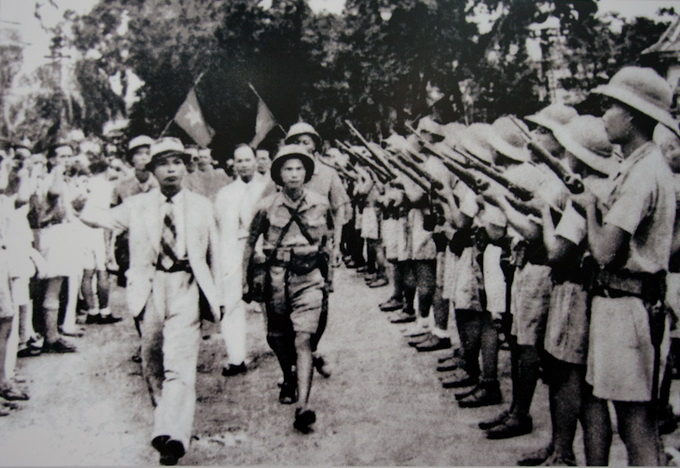 八月革命におけるベトミンら。